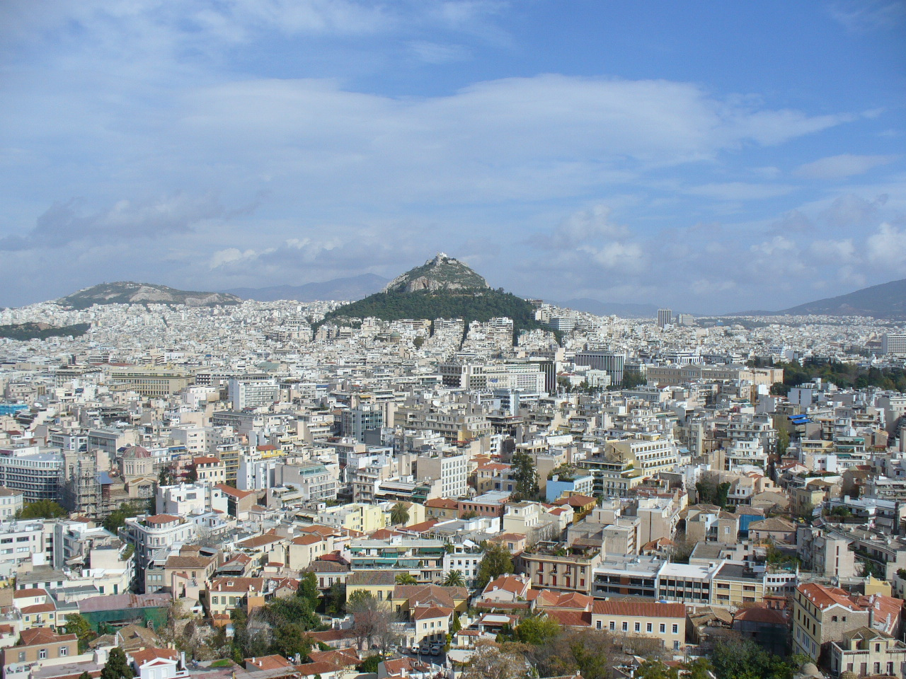 Atenas e o monte Lycabettus